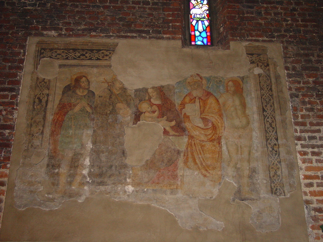 Chiesa di San Cristoforo - Milano - Italy - Affreschi.